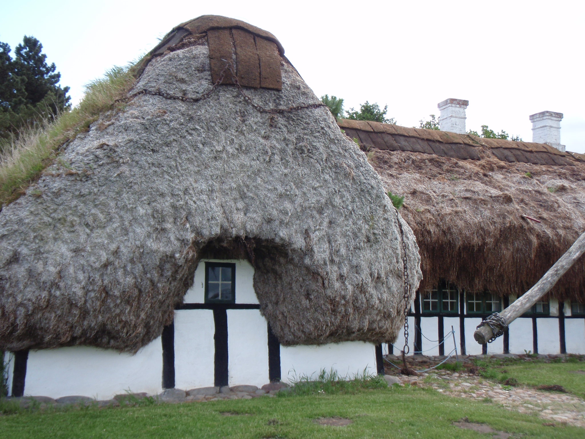 Billede taget på Wiki-fotodag juni 2012. Frilandsmuseet.